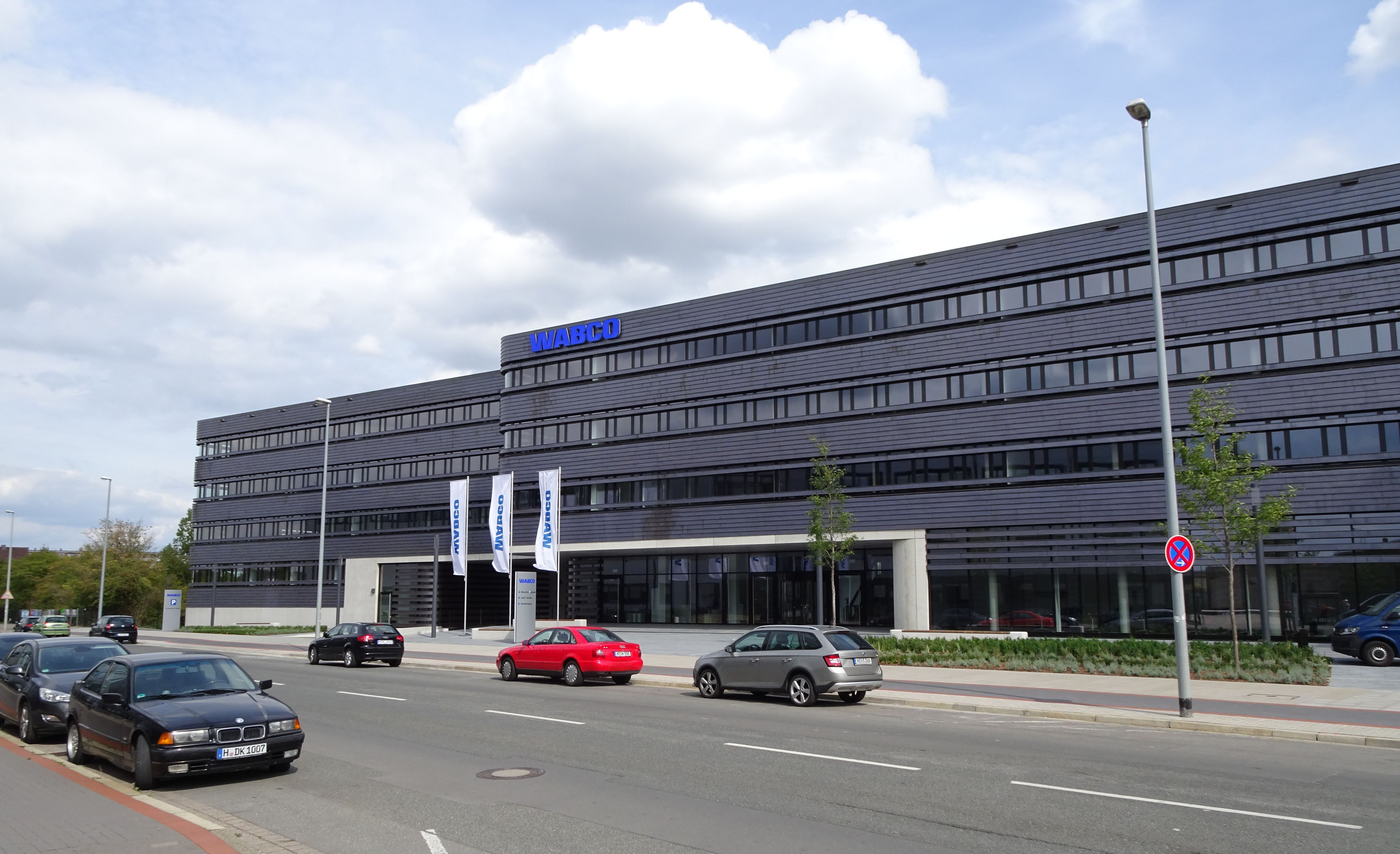 Wabco Technologie- und Innovationszentrum 2018